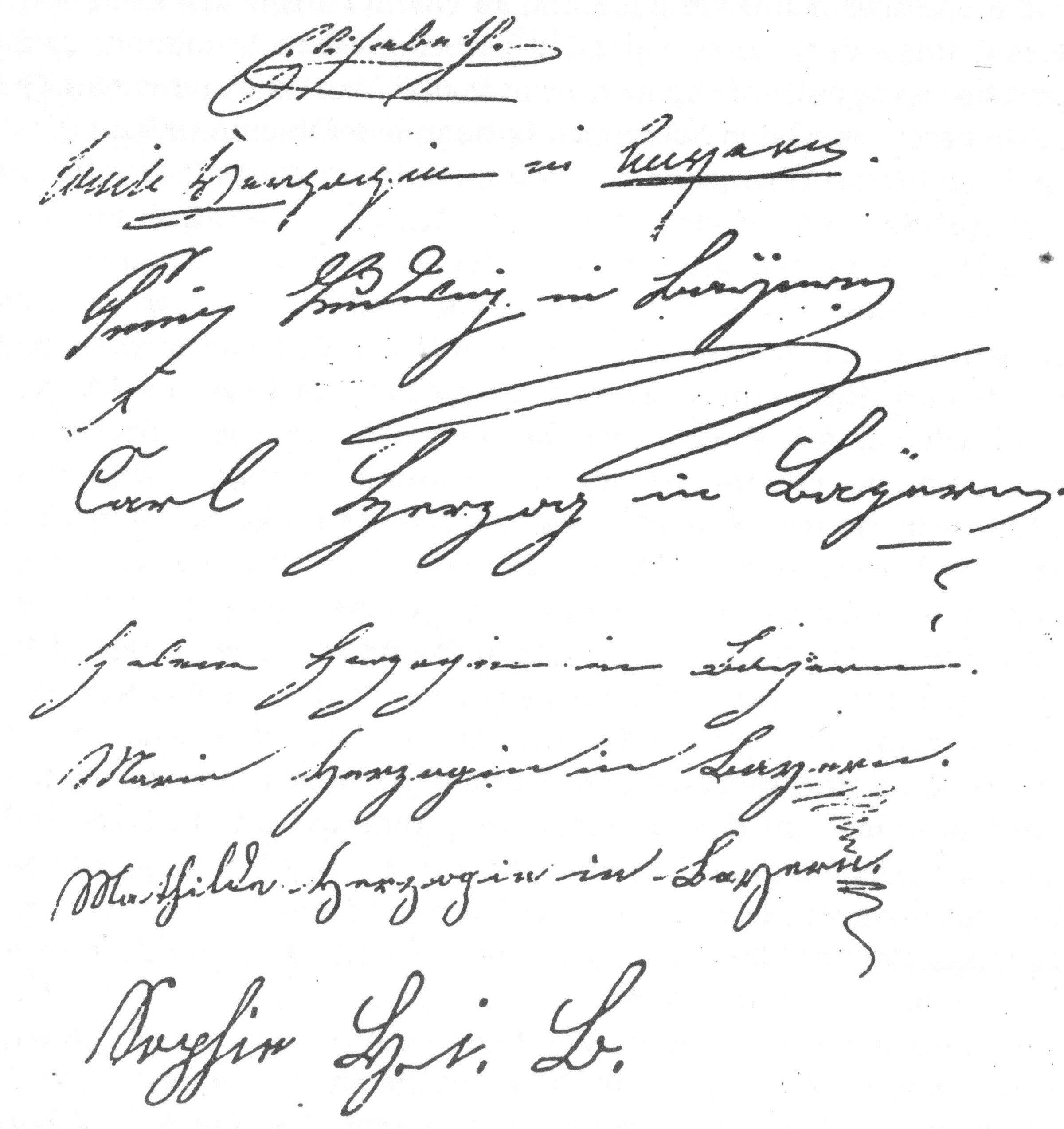 Ausschnitt aus dem Bordbuch der Maximilian, S. 8. Ganz oben hat Kaiserin Elisabeth unterschrieben